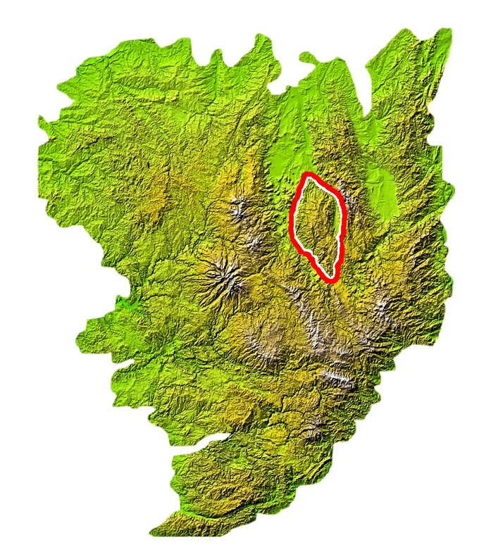 Emplacement des Monts du Livradois sur la carte du Massif central